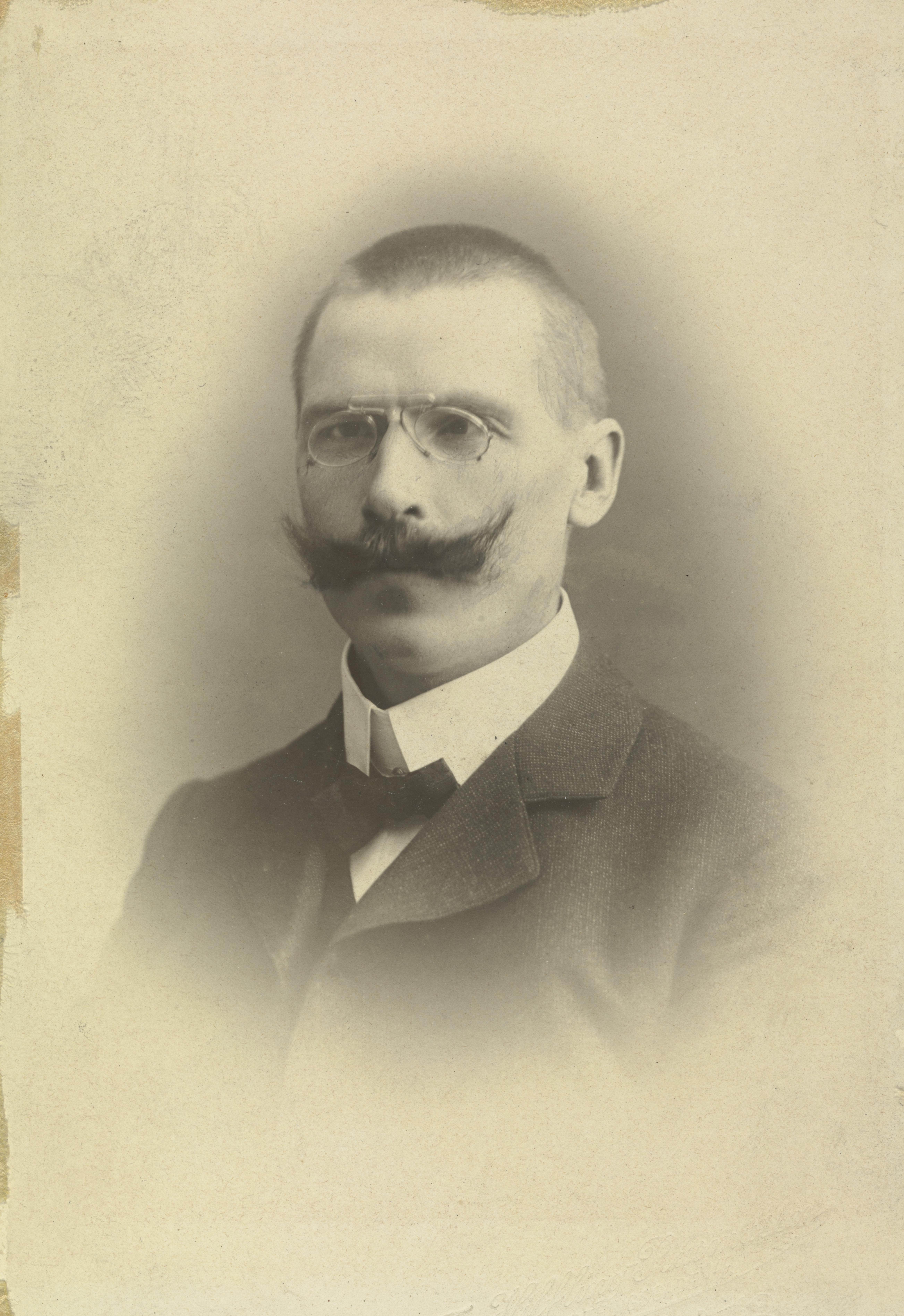 Bildet er hentet fra Nasjonalbibliotekets bildesamling